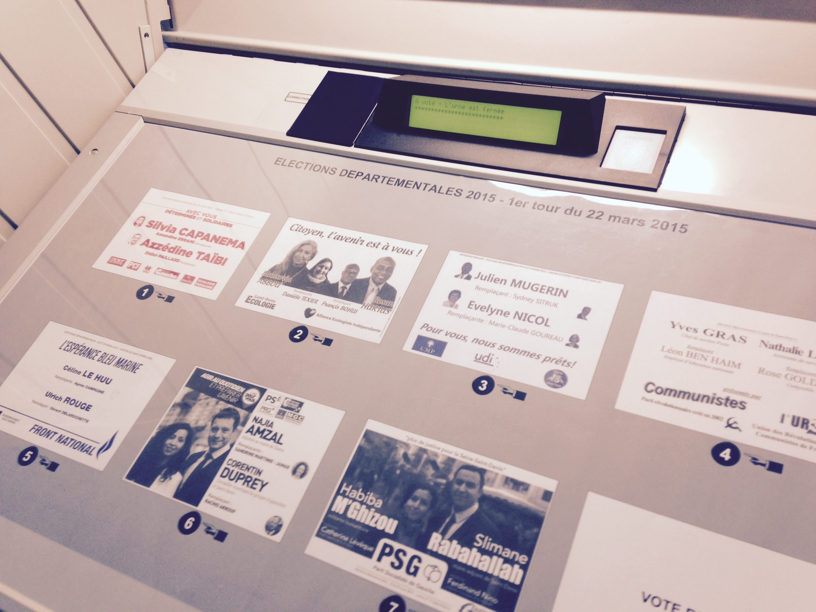 Nedap machine à voter utilisée à Stains (Seine-Saint-Denis, France) pour le 1er tour des élections départementales le 22 mars 2015